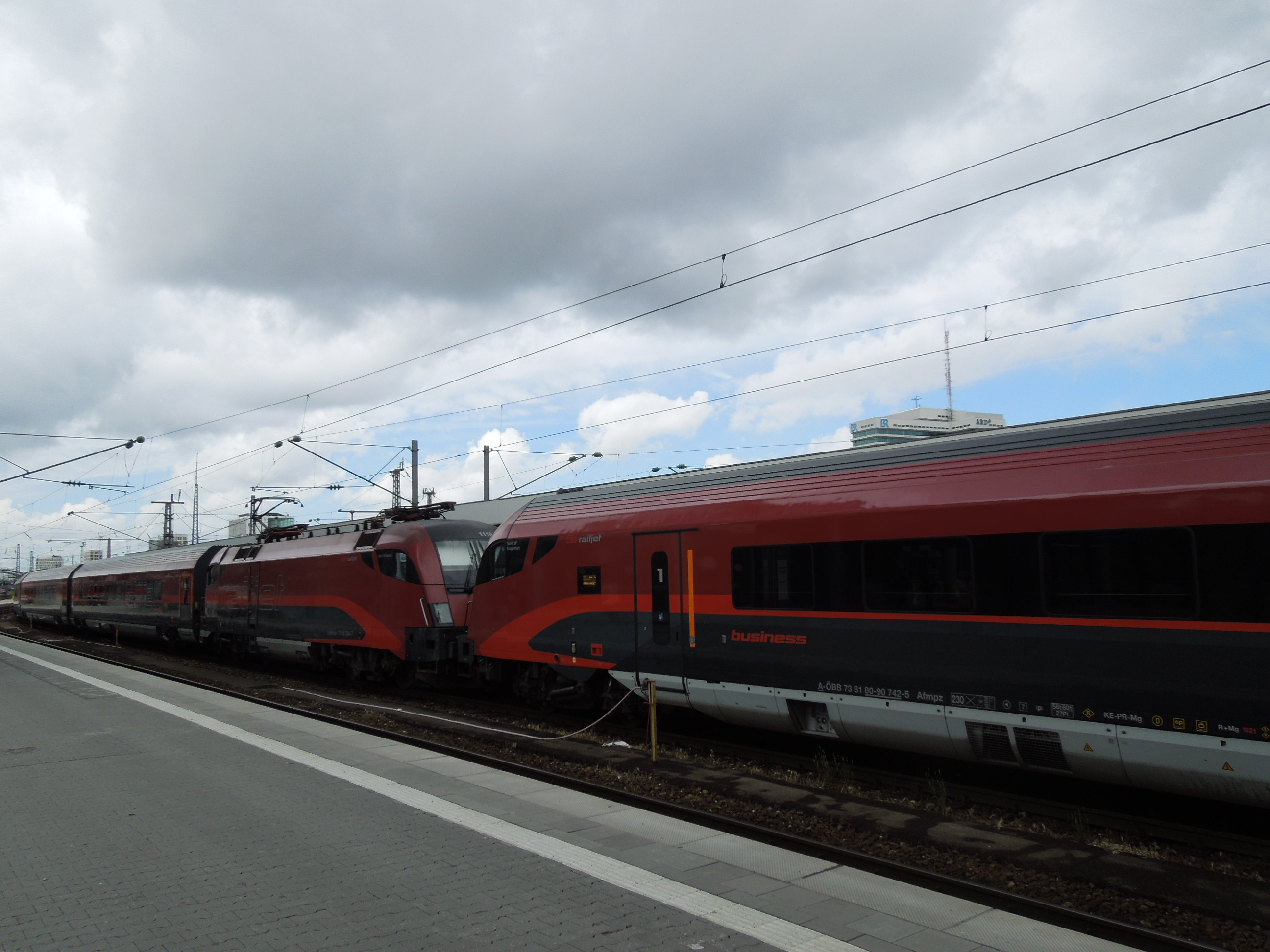 Railjet München Hauptbahnhofon